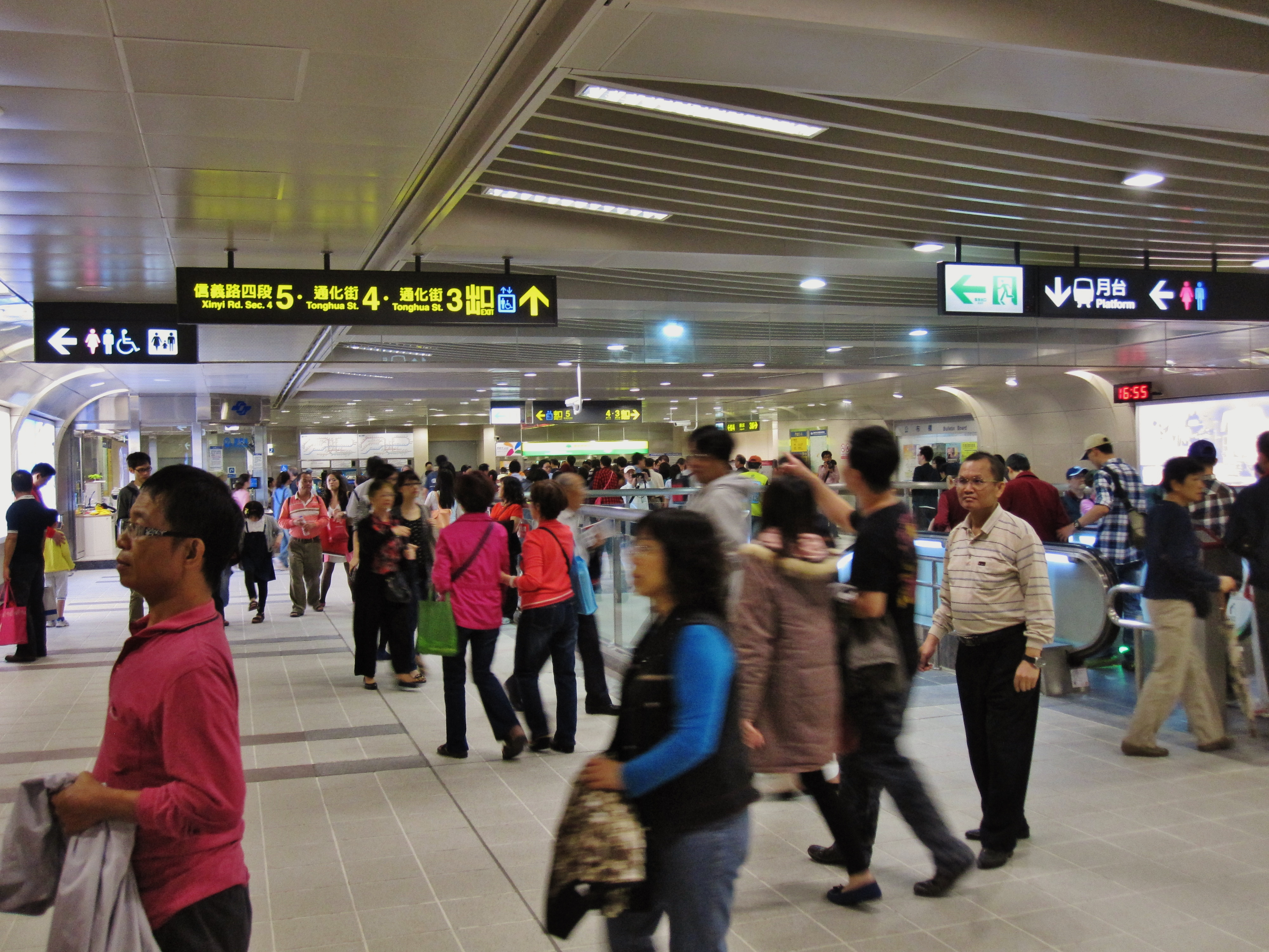 台北捷運信義線信義安和站穿堂層。